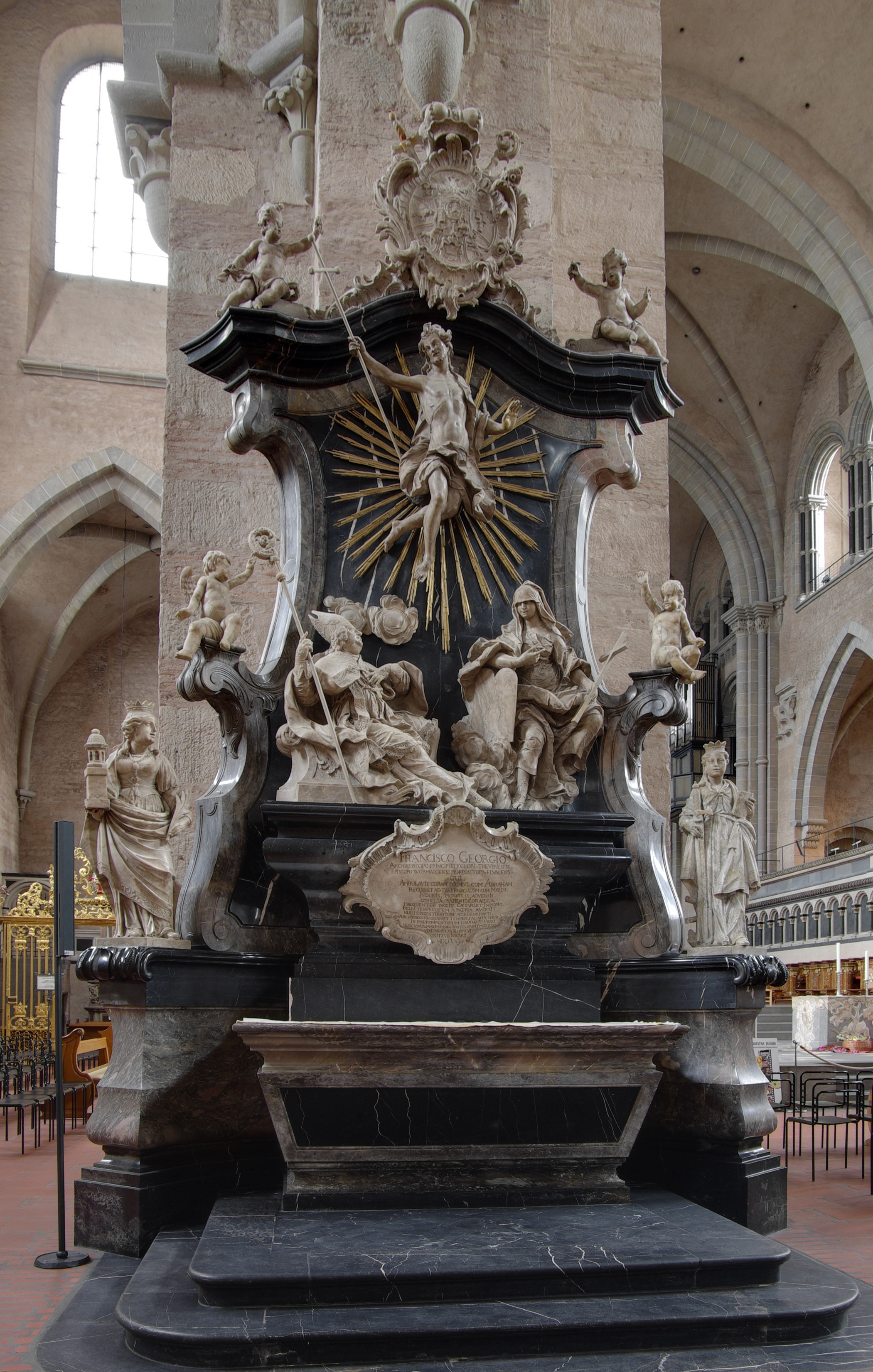 Trierer Dom, Mittelschiff linke Seite, Auferstehungsaltar, Grabaltar Franz Georg von Schönborn